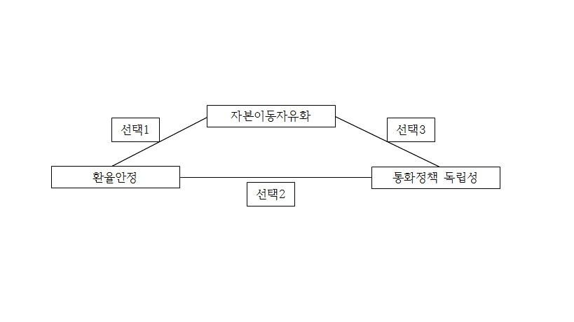 불가능의 삼각정리의 삼각형을 도식화